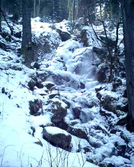 Cascades du Stolz Ablass